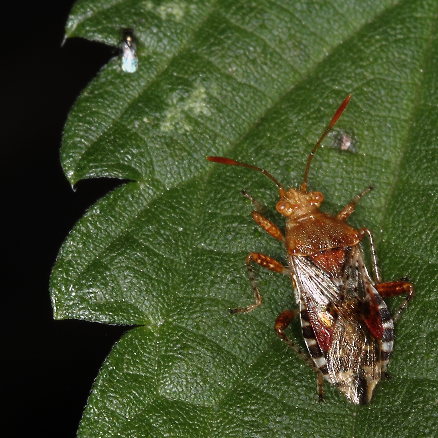 Sachsen, Waldrand: Hellbraune Glasflügelwanze